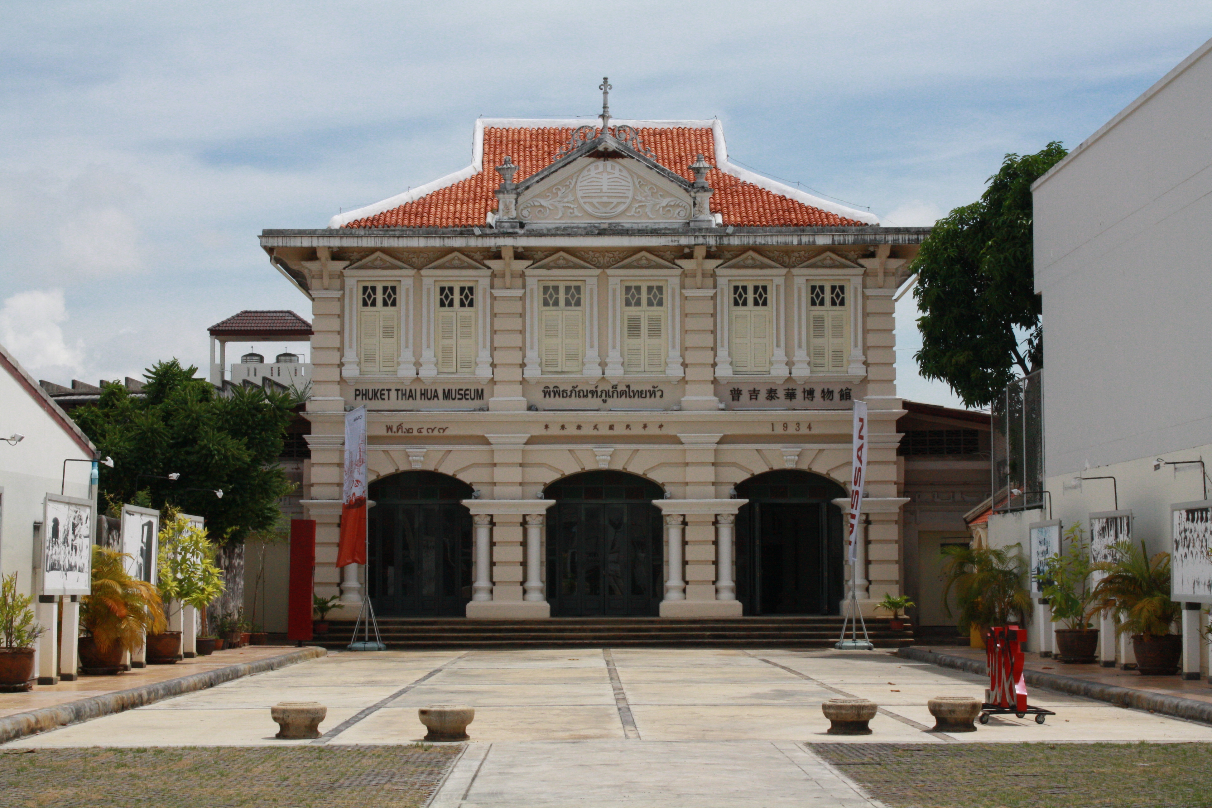 Музей китайского быта (Thai Hua) в бывшем здании китайской школы.